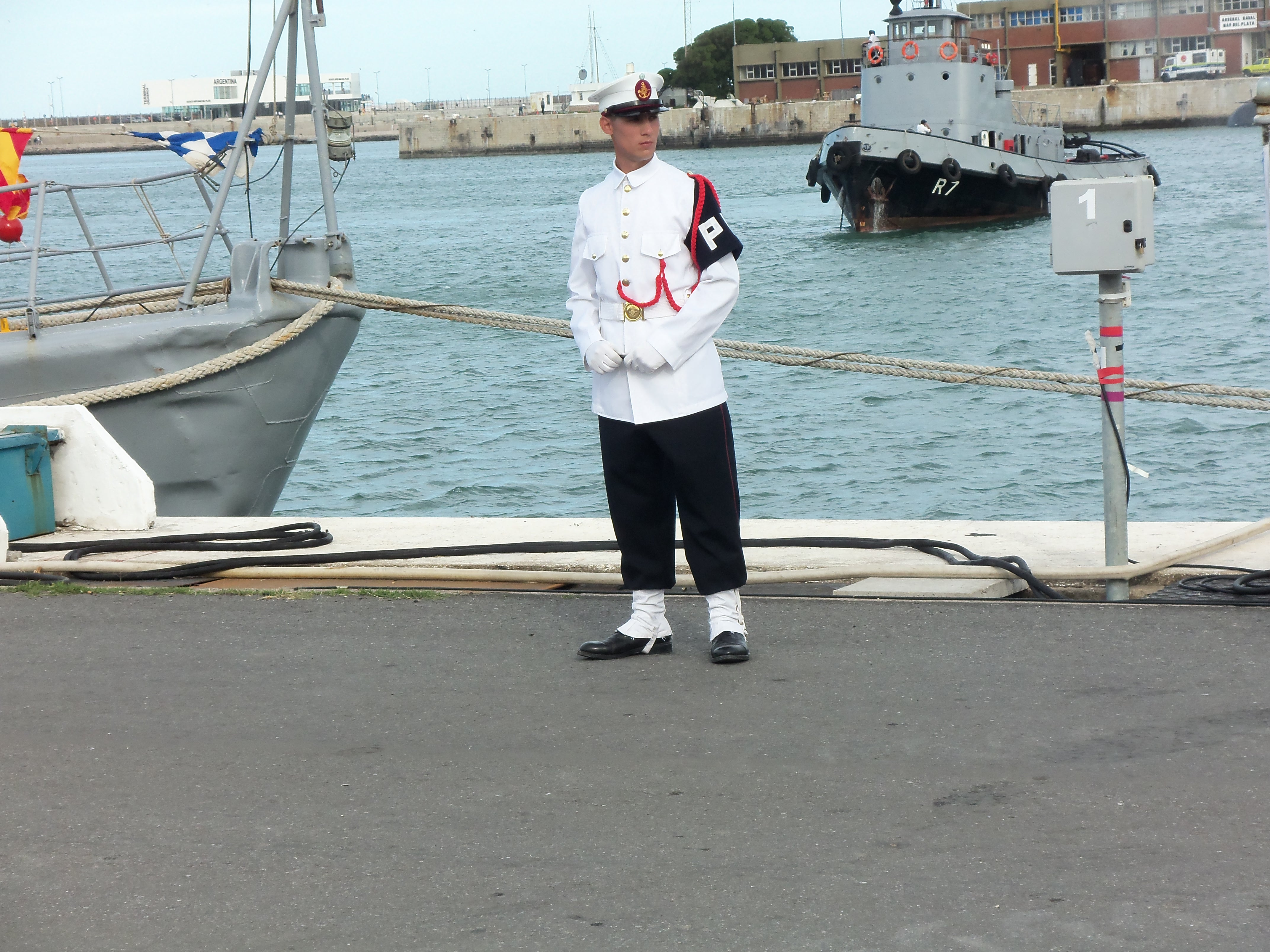 Arribo a Mar del Plata Argentina de la Fragata ARA Libertad provienente de Ghana